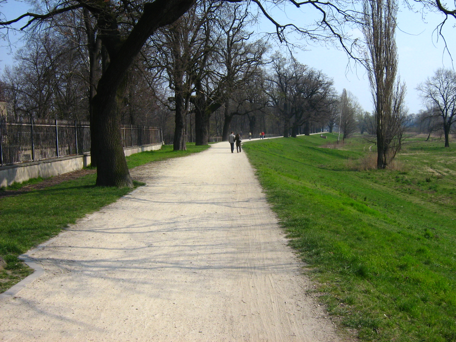 Bicycle path (ścieżka rowerowa), Grobla, Wrocław, Poland